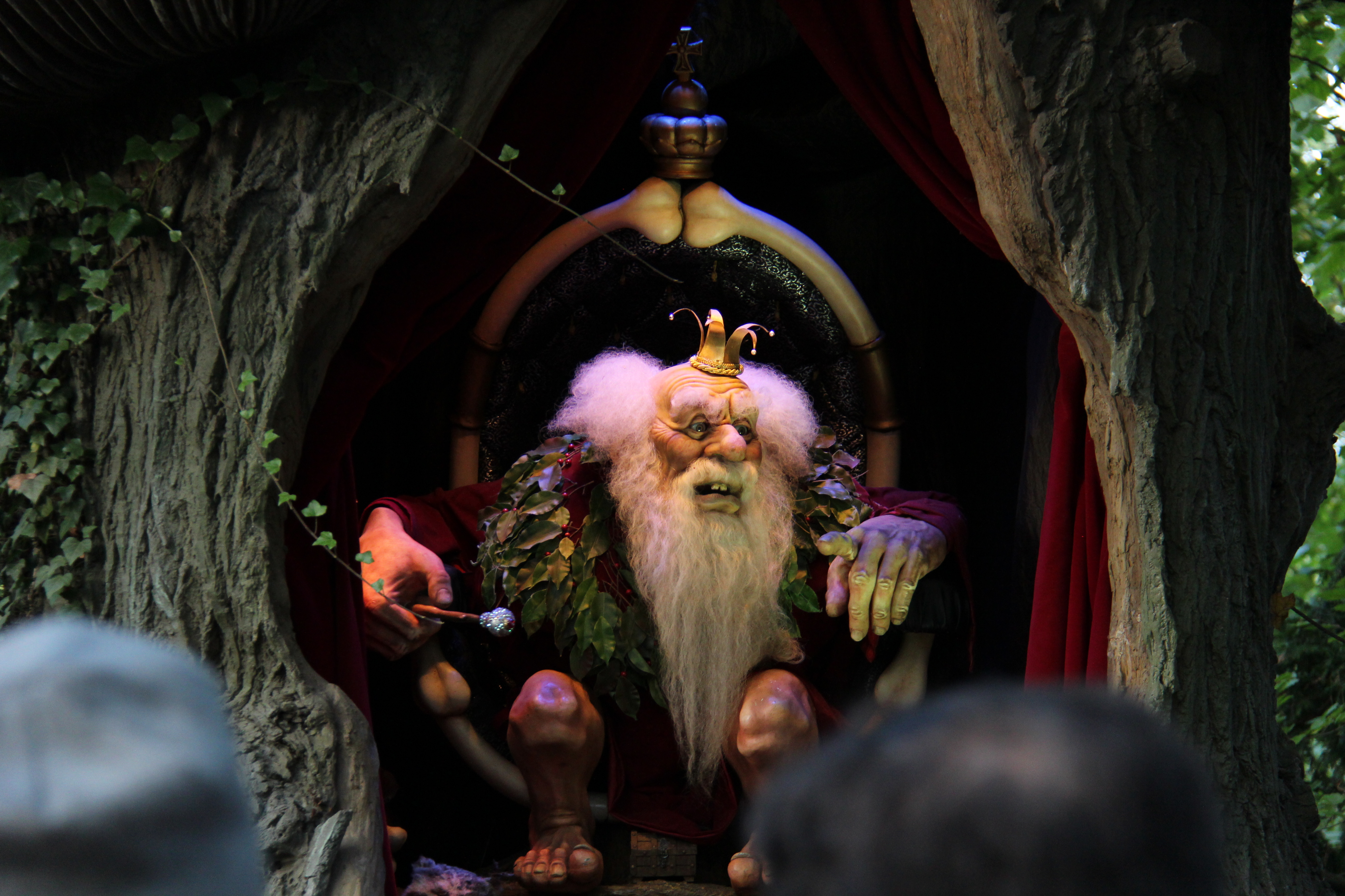 trollenkoning in de efteling